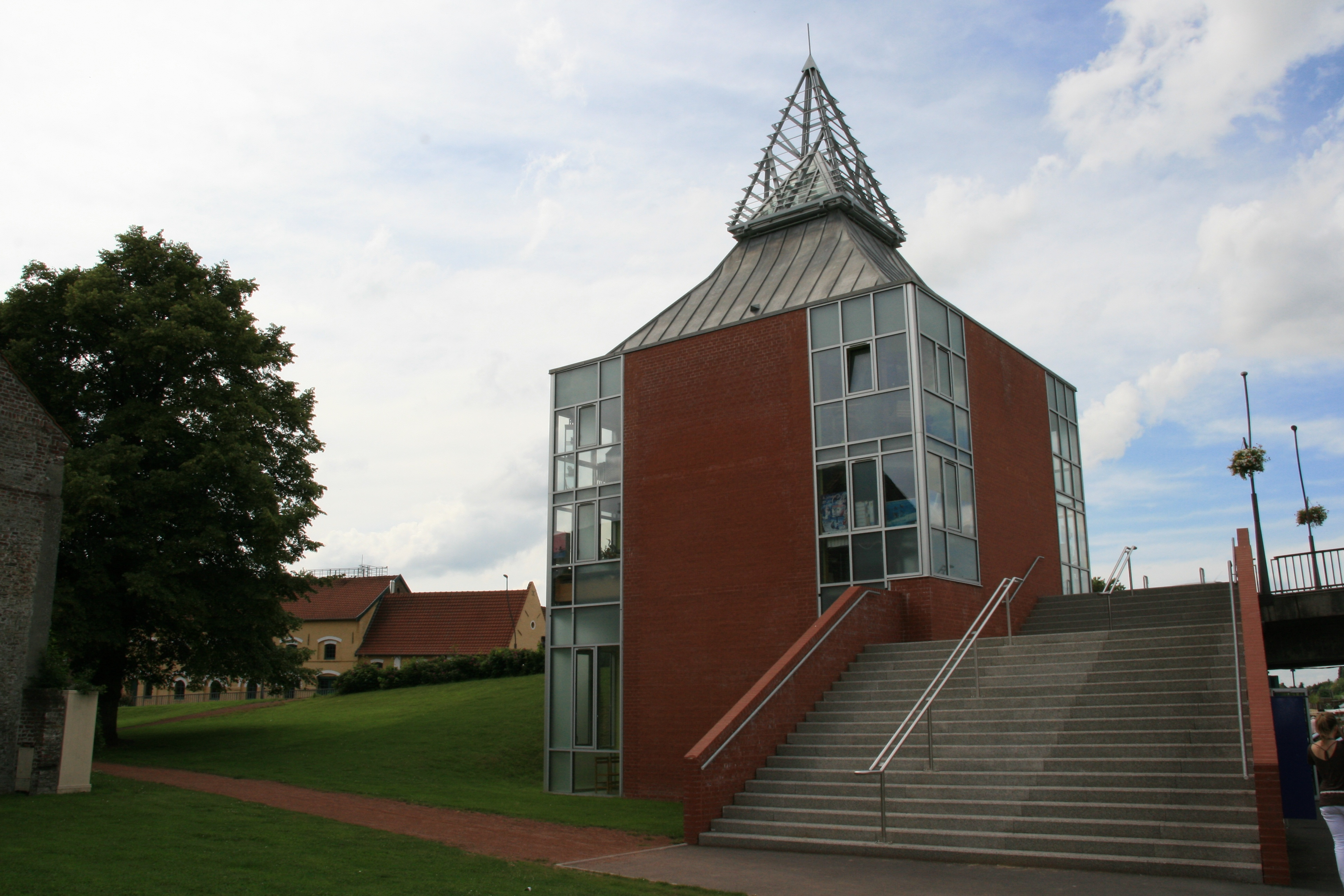 Photo prise en été 2007 par Johan BEN AZZOUZ